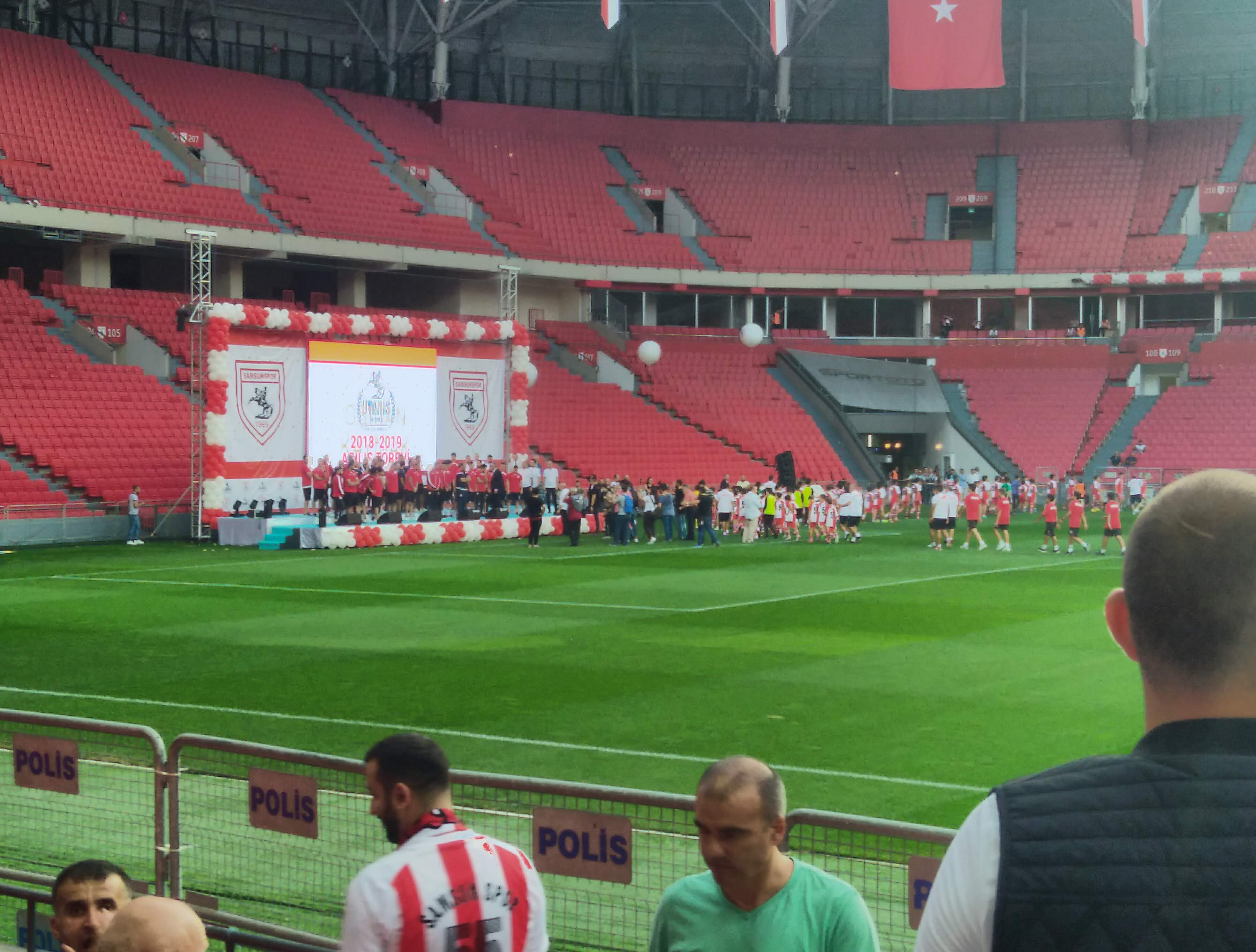 Samsun'un Tekkeköy ilçesinde bulunan 19 Mayıs Stadyumu'nda gerçekleştirilen Samsunspor 2018-19 sezon açılış töreninden bir görüntü.